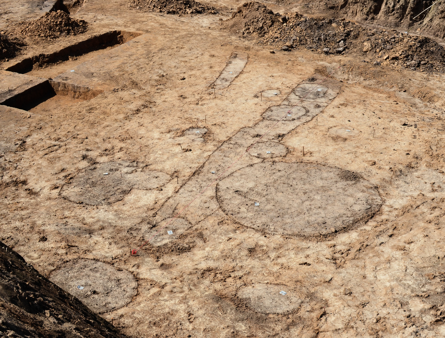 Bandkeramische Fundplatz von Imbshausen und Eboldshausen, Pfostenlöcher und Gruben